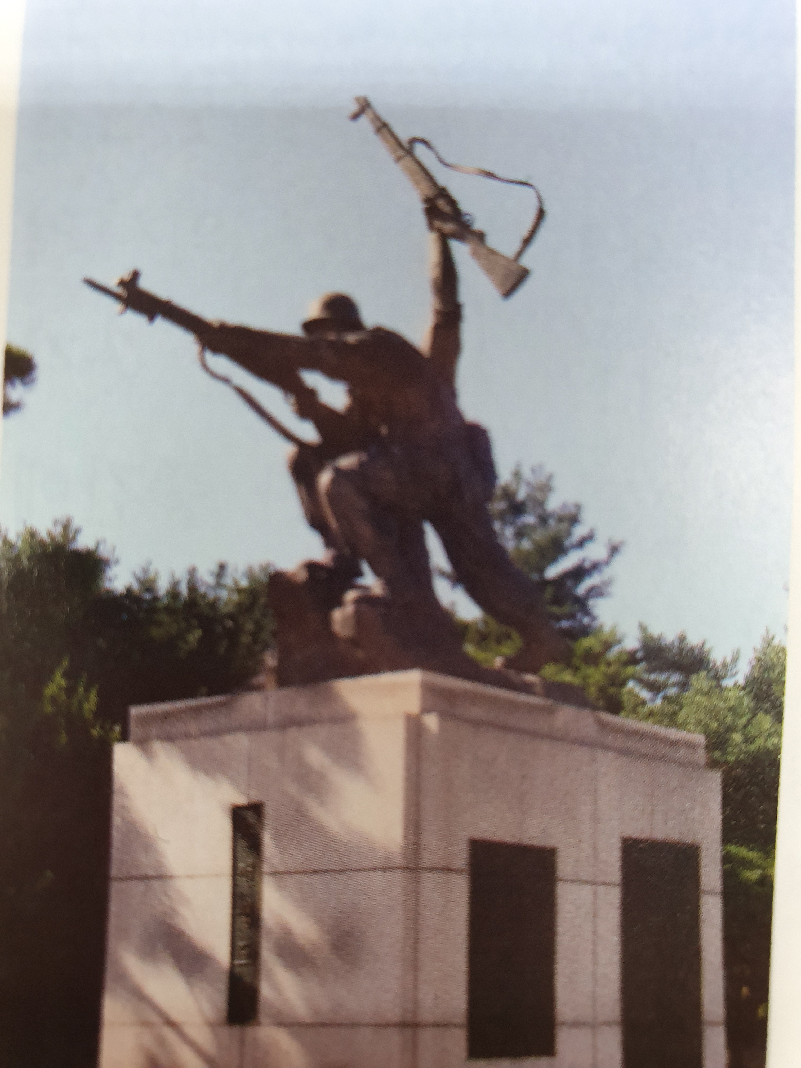 생도의 신분으로 참전한 생도 1기, 2기를 기리기 위해 도서관 앞에 설치되었다.